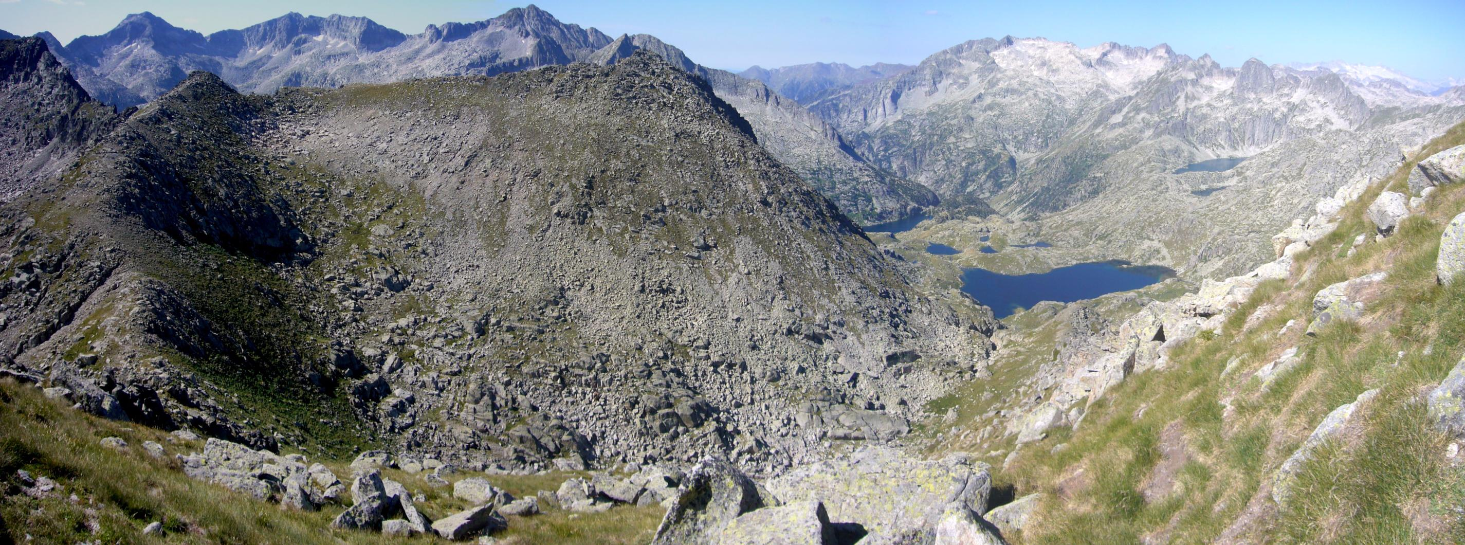 Pics i Estany de Travessani, vistos des del Tuc del Port de Caldes; la Vall de Boí, Alta Ribagorça, Catalunya